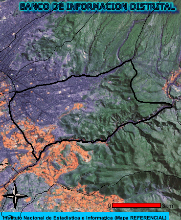 mapa satelital del distrito de Paucarpata